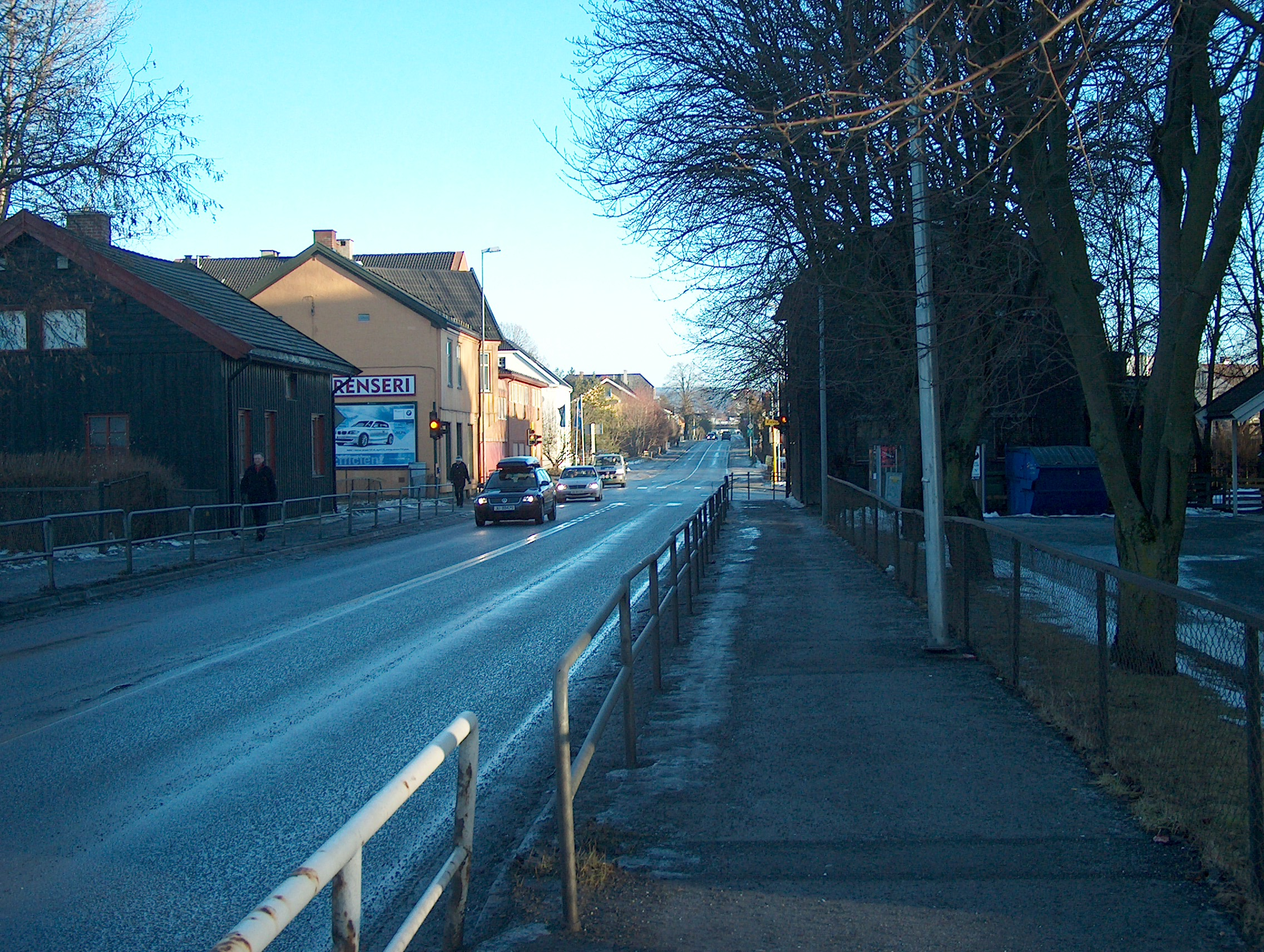 Søndre del av Hønengaten på Nordsiden av Hønefoss